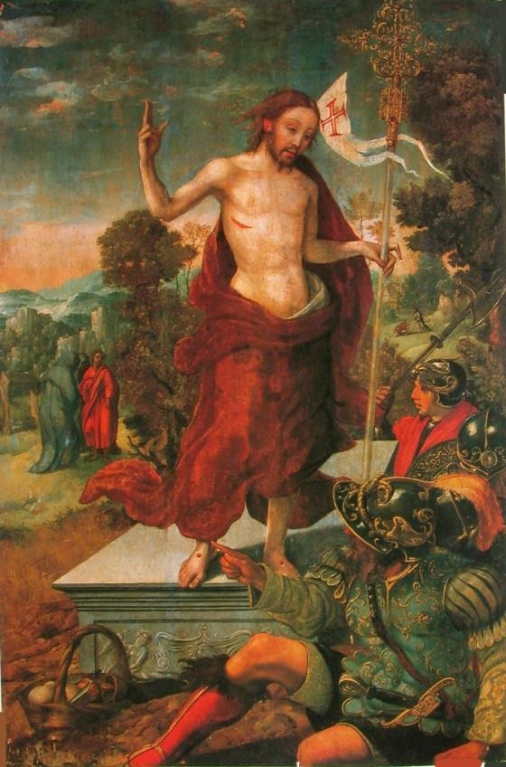 Ressurreição. Óleo sobre madeira, 132,5 x 80,5 cm. Diogo de Contreiras, 1540 a 1545. Proveniente do convento de Santa Maria de Almoster, Santarém. Colecção particular, Lisboa.